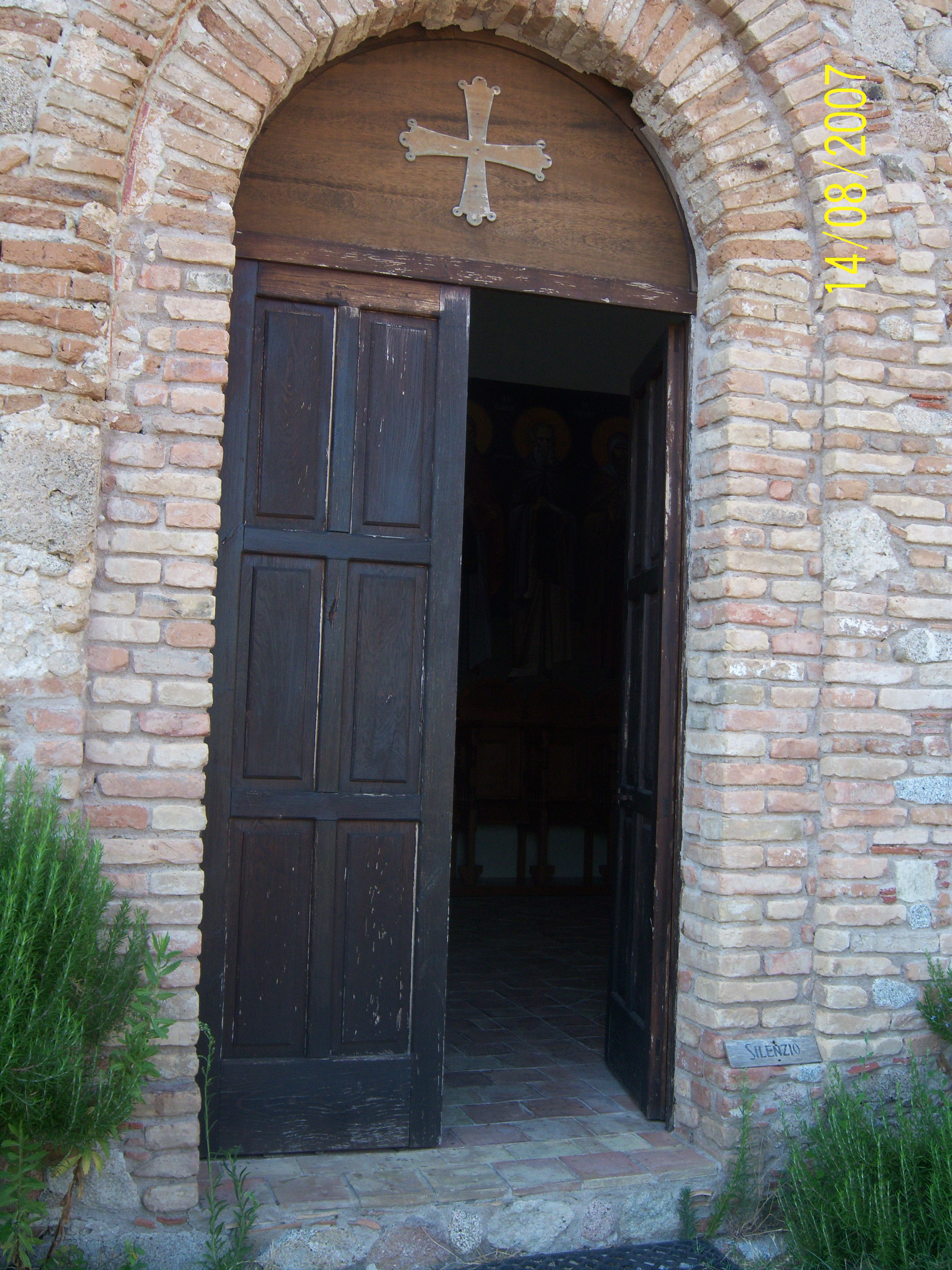 Porta_d'ingresso di Therestis